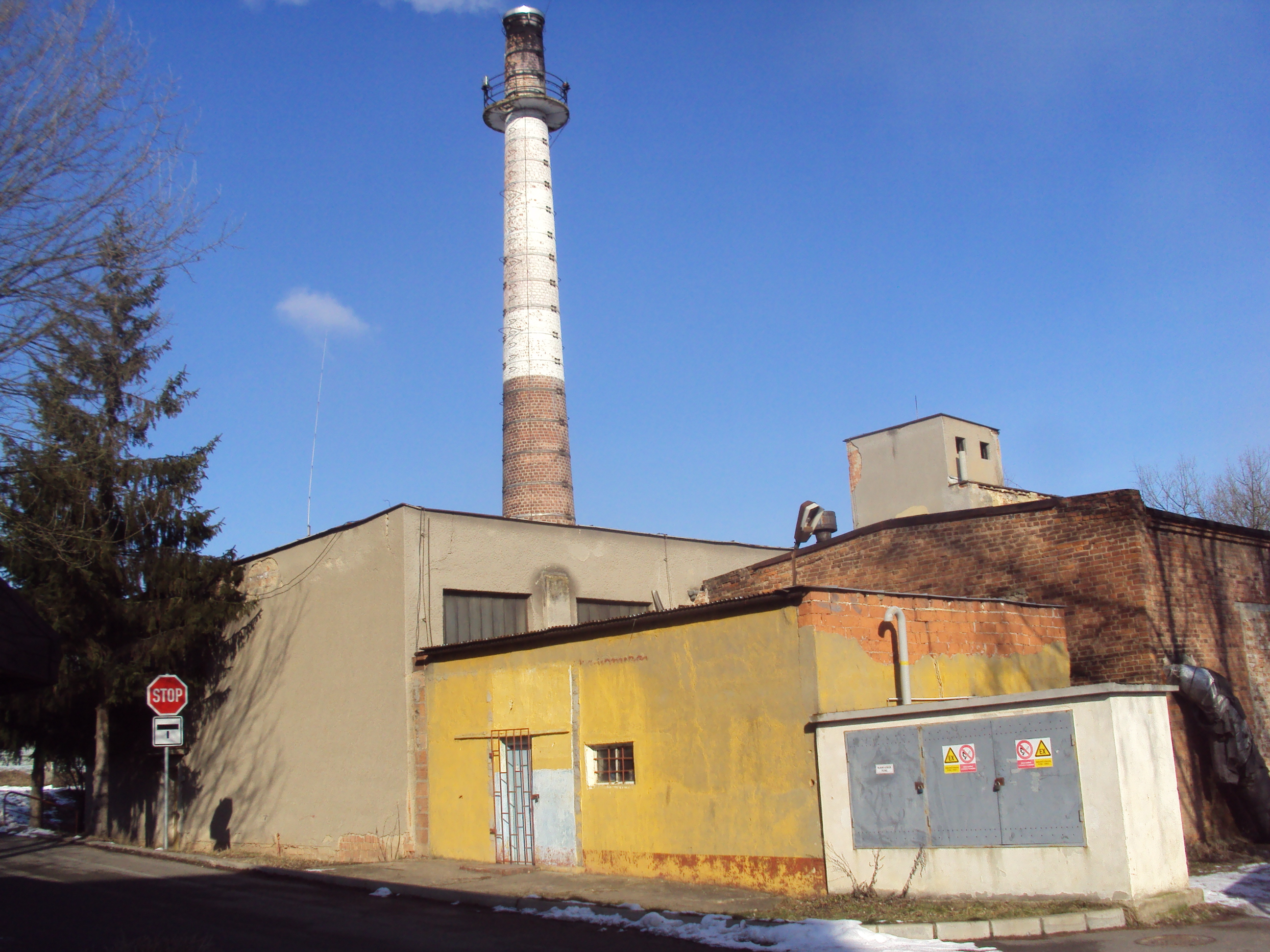 Kotelna (Boiler house) v Nových Zákupech